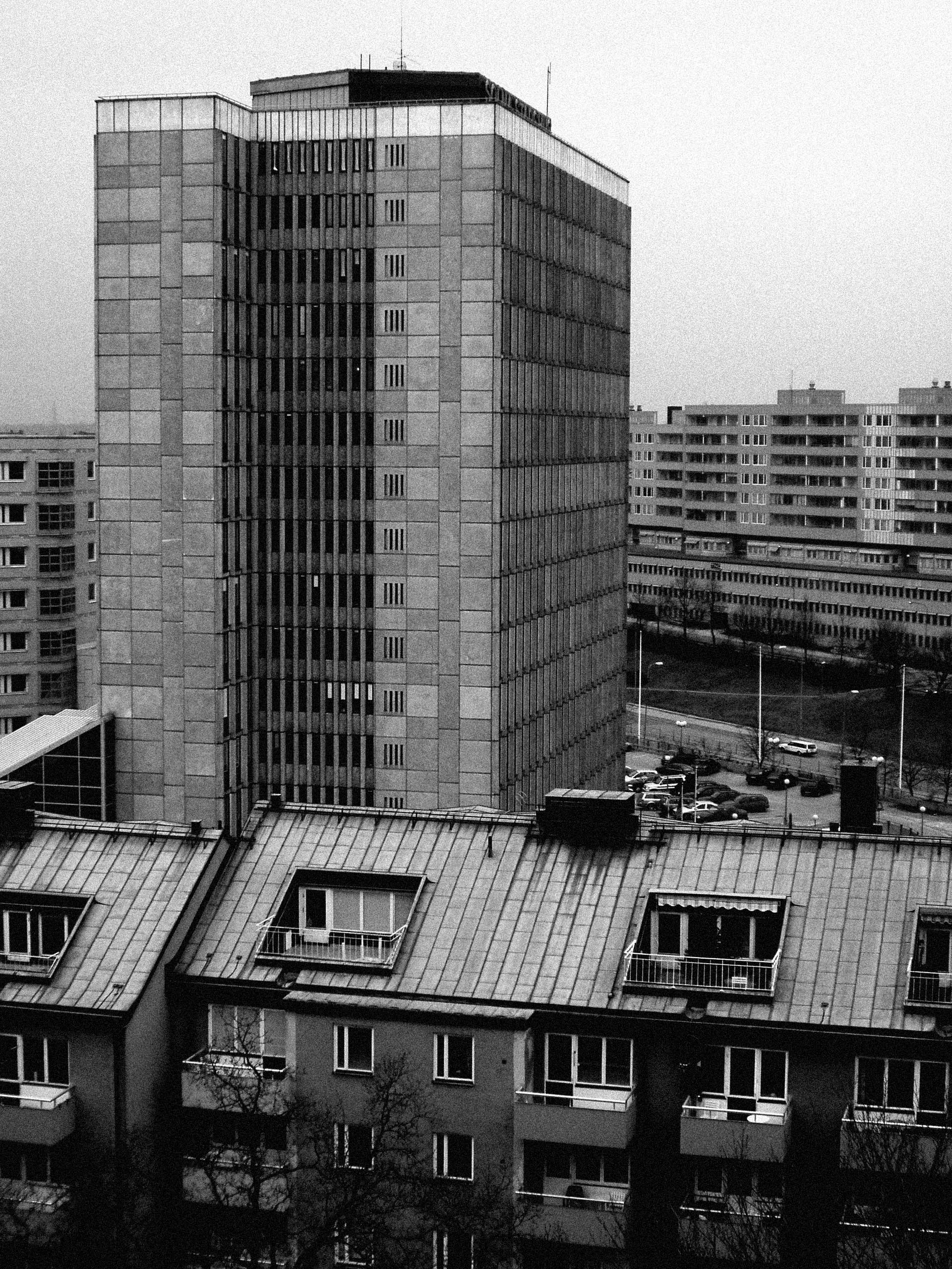 Solna stadshus från syd. Foto: Robin Rönnlund